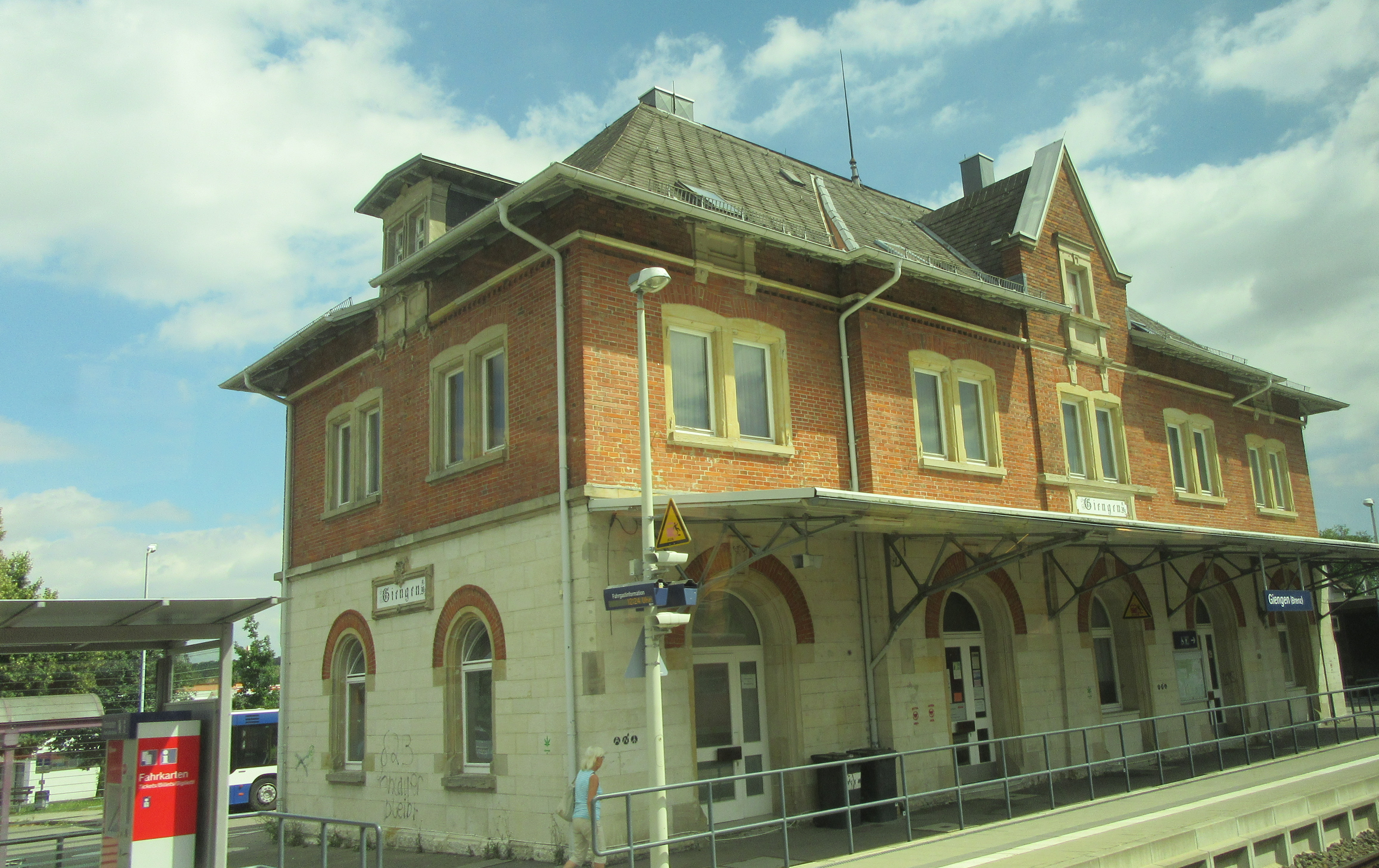 Empfangsgebäude Giengen (Brenz), am 13. August 2016 durch ein Zugfenster aufgenommen.